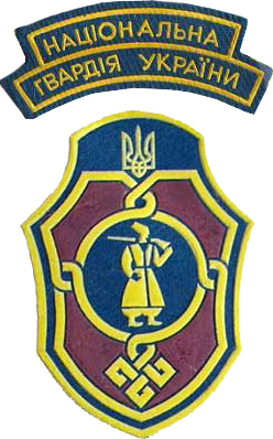 Нарукавний знак, 2 Східна дивізія НГУ